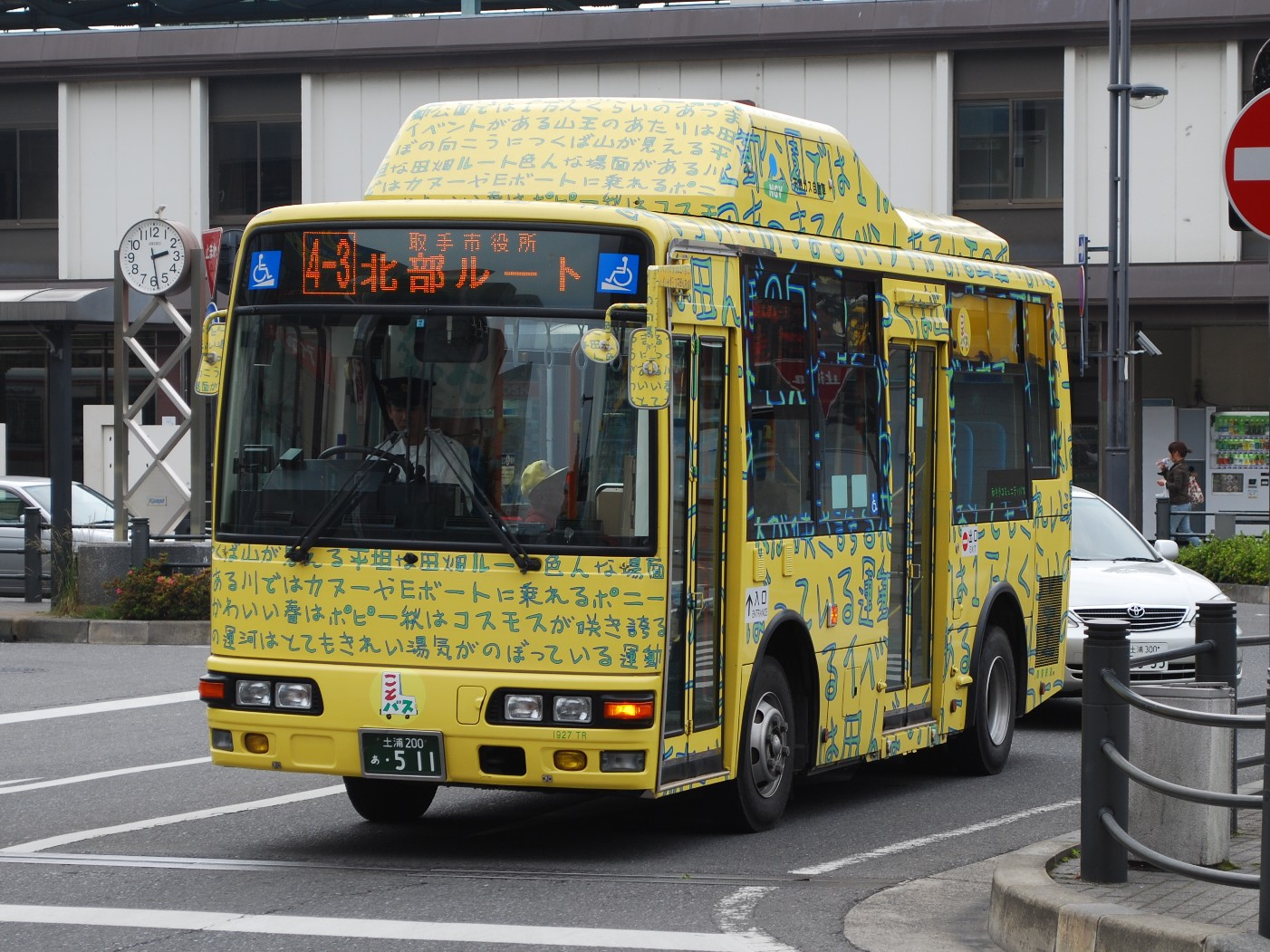 関東鉄道バス取手営業所1927号車。取手駅東口歩道上にて撮影。取手市コミュニティバス「ことバス」。